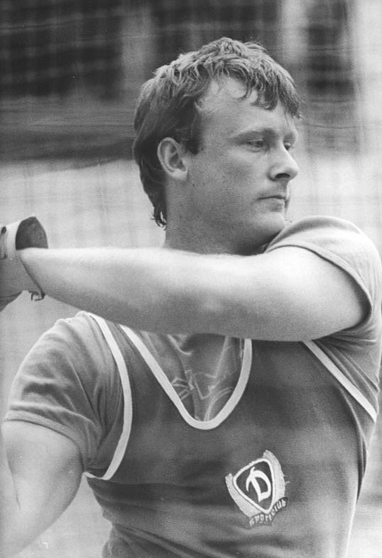 Matthias Moder ADN-ZB Lehmann 11.06.1985 Halle: DVfL-Sportfest-Zum Auftakt des Sportfestes in Halle sorgte der Berliner Dynamo-Sportler Matthias Moder mit 80,92 m für einen neuen DDR-Rekord im Hammerwerfen.